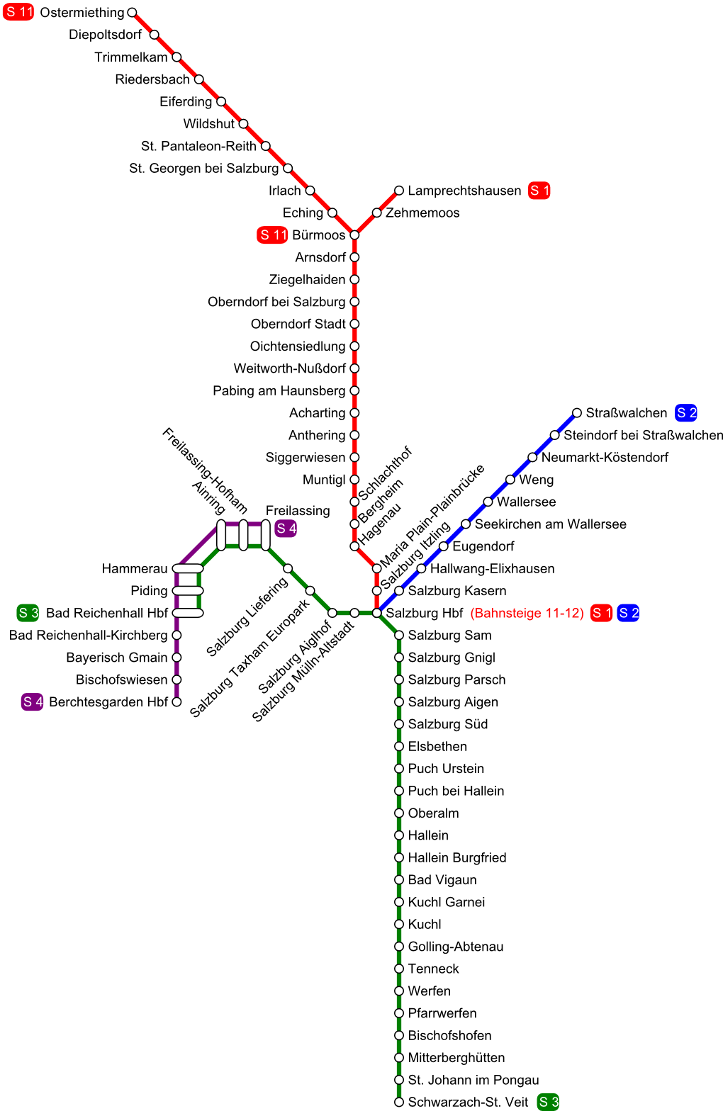 Netzplan der S-Bahn Salzburg